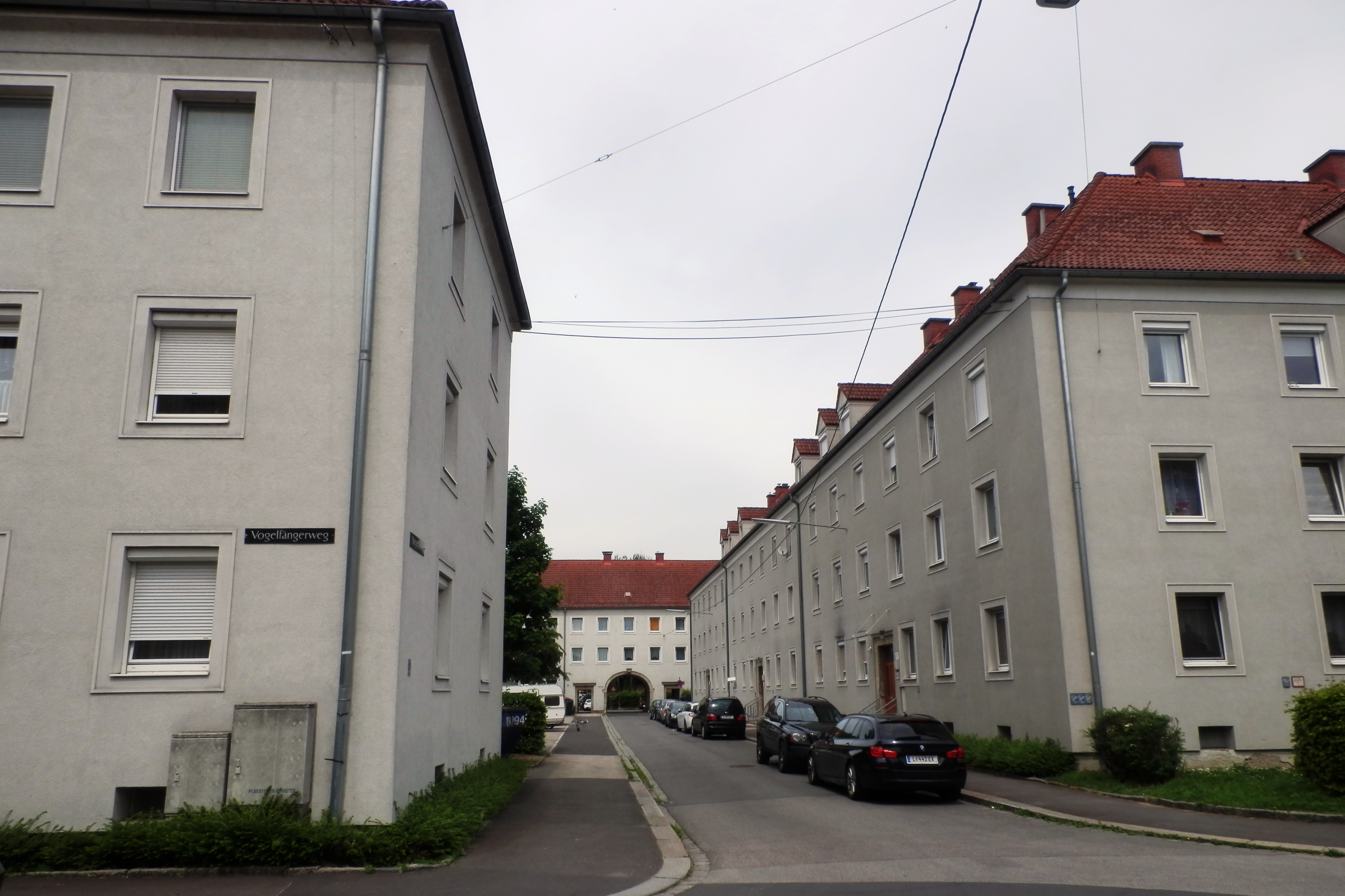 Schörgenhubsiedlung - Negrelliweg / Vogelfängerweg